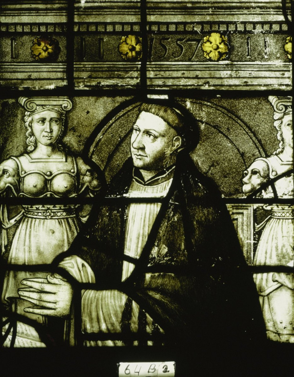 Sint Janskerk: interieur, glas in loodraam NR. 64, detail B 2